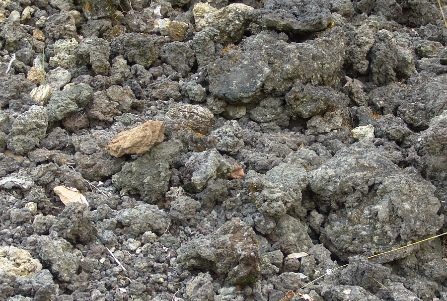 Vulkanschlacke am Železná hůrka (deutsch: Eisenbühl) (2005) Fotograf: Walter J. Pilsak, Waldsassen Copyright Status: GNU Freie Dokumentationslizenz